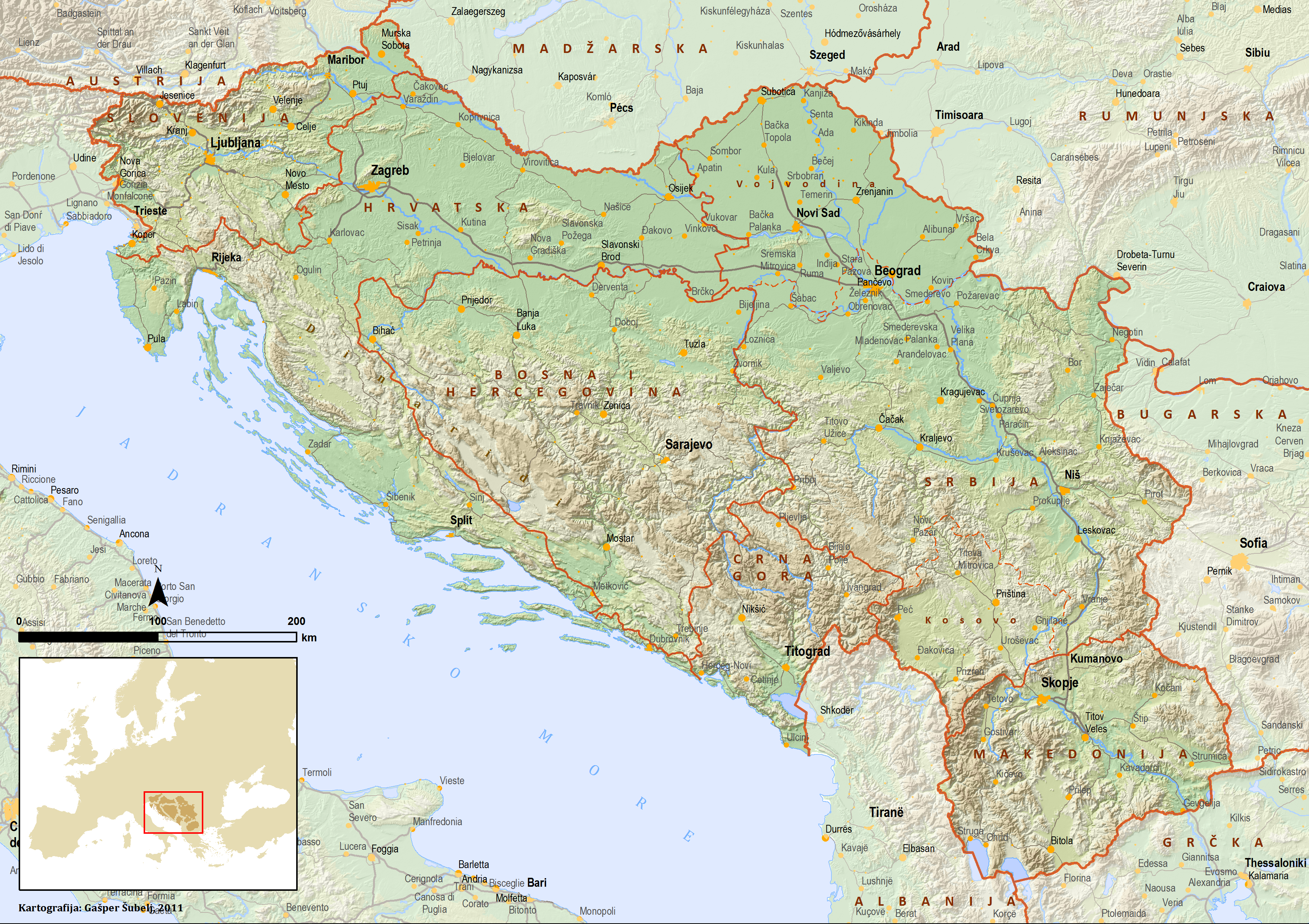 Opća karta SFRJ (1945-1991) - hrvatski napisi